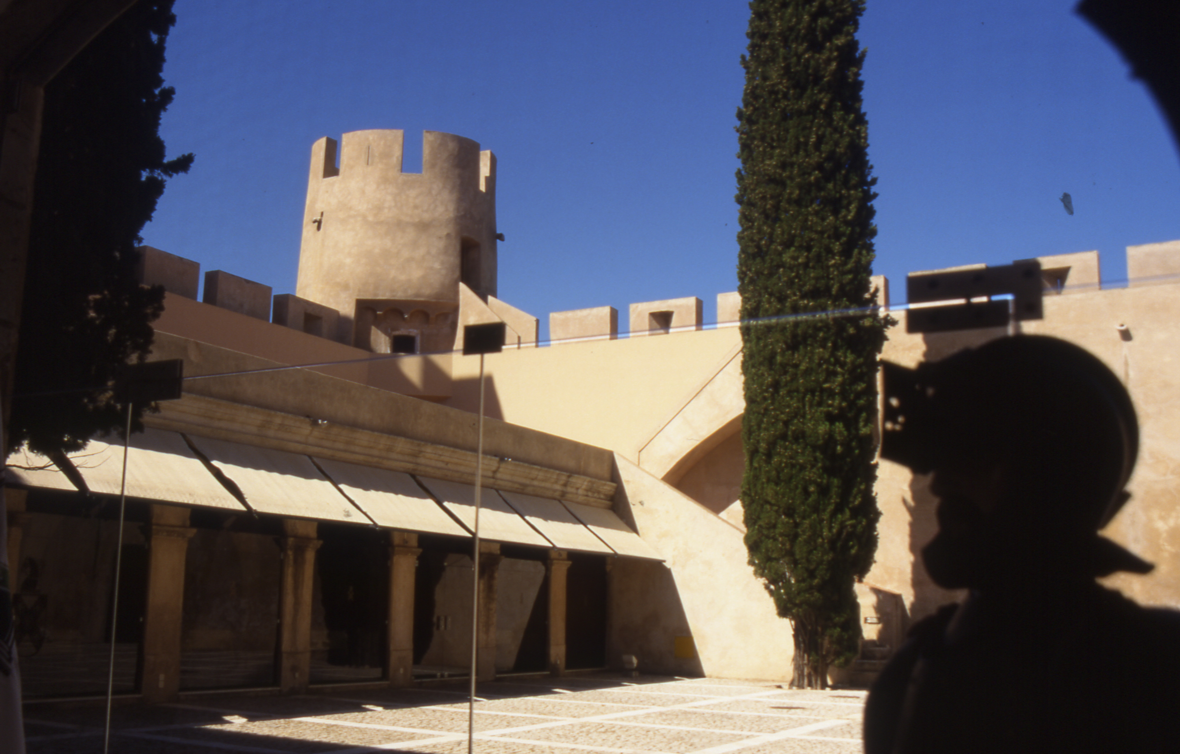 Alvito / In der Burg